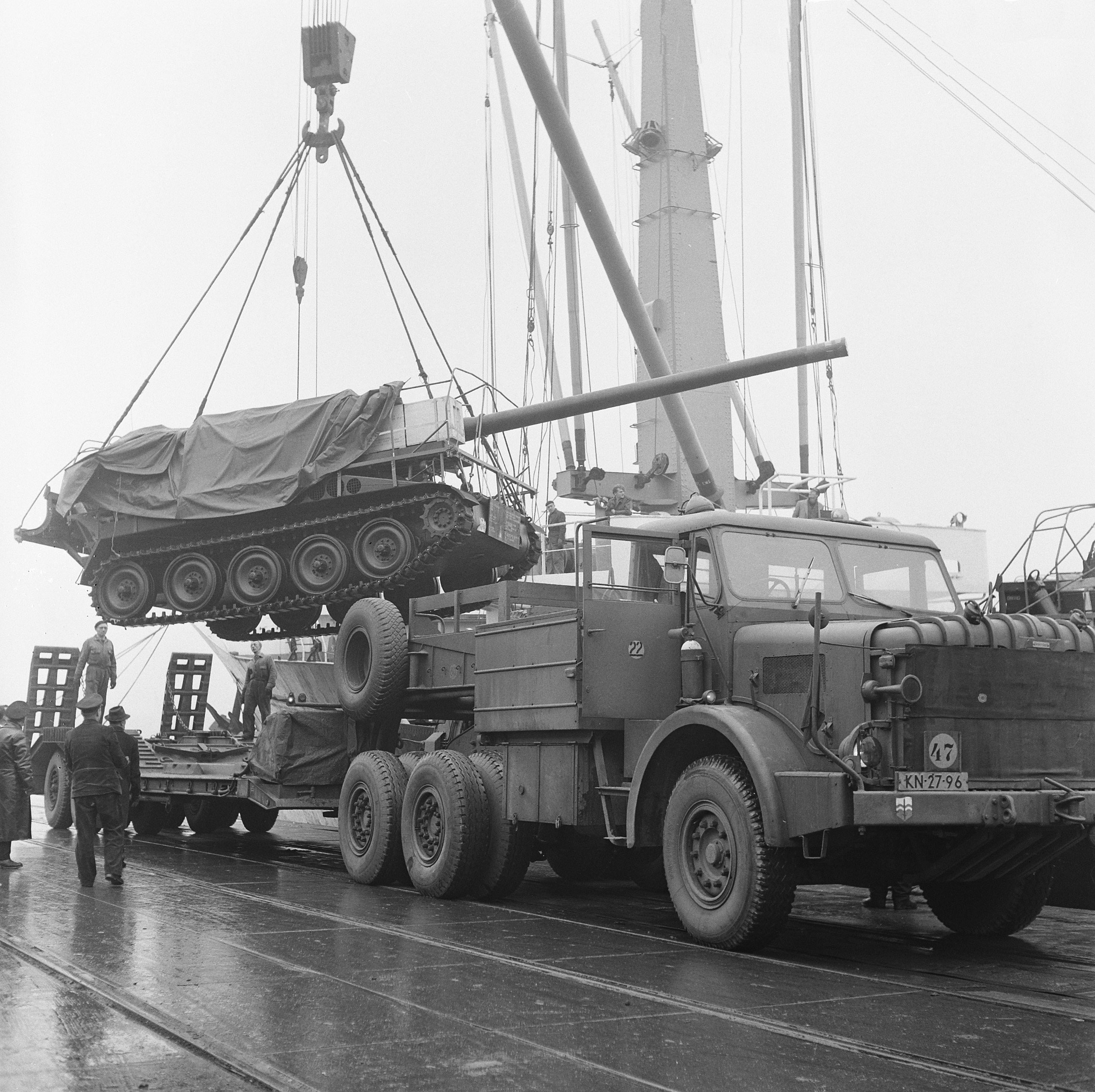 Collectie / Archief : Fotocollectie Anefo Reportage / Serie : [ onbekend ] Beschrijving : Houwitsers 175 mm, uit Amerika in Rotterdam aangekomen worden verladen Datum : 26 januari 1966 Locatie : Rotterdam Trefwoorden : artillerie, geschut, vervoermiddelen Fotograaf : Voets, Jan / Anefo Auteursrechthebbende : Nationaal Archief Materiaalsoort : Negatief (zwart/wit) Nummer archiefinventaris : bekijk toegang 2.24.01.03 Bestanddeelnummer : 918-7242